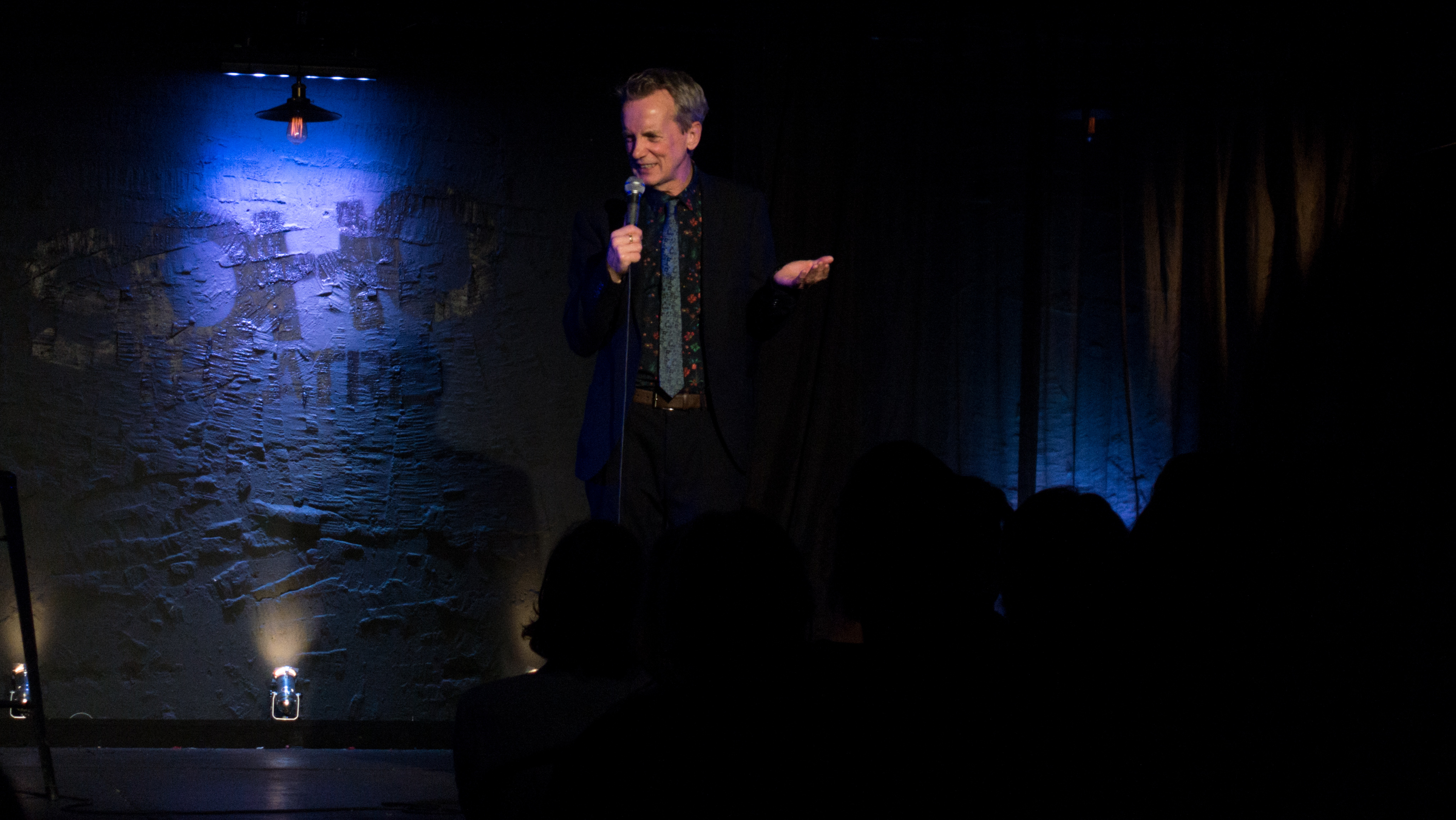 Frank Skinner